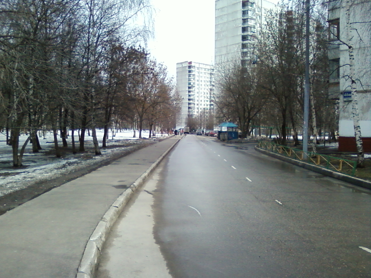 Северная оконечность Керамического проезда. Вид от Дубнинской улицы на юго-восток (собственно, ближний дом имеет номер по Дубнинской, 46). Застройка 1979 года.